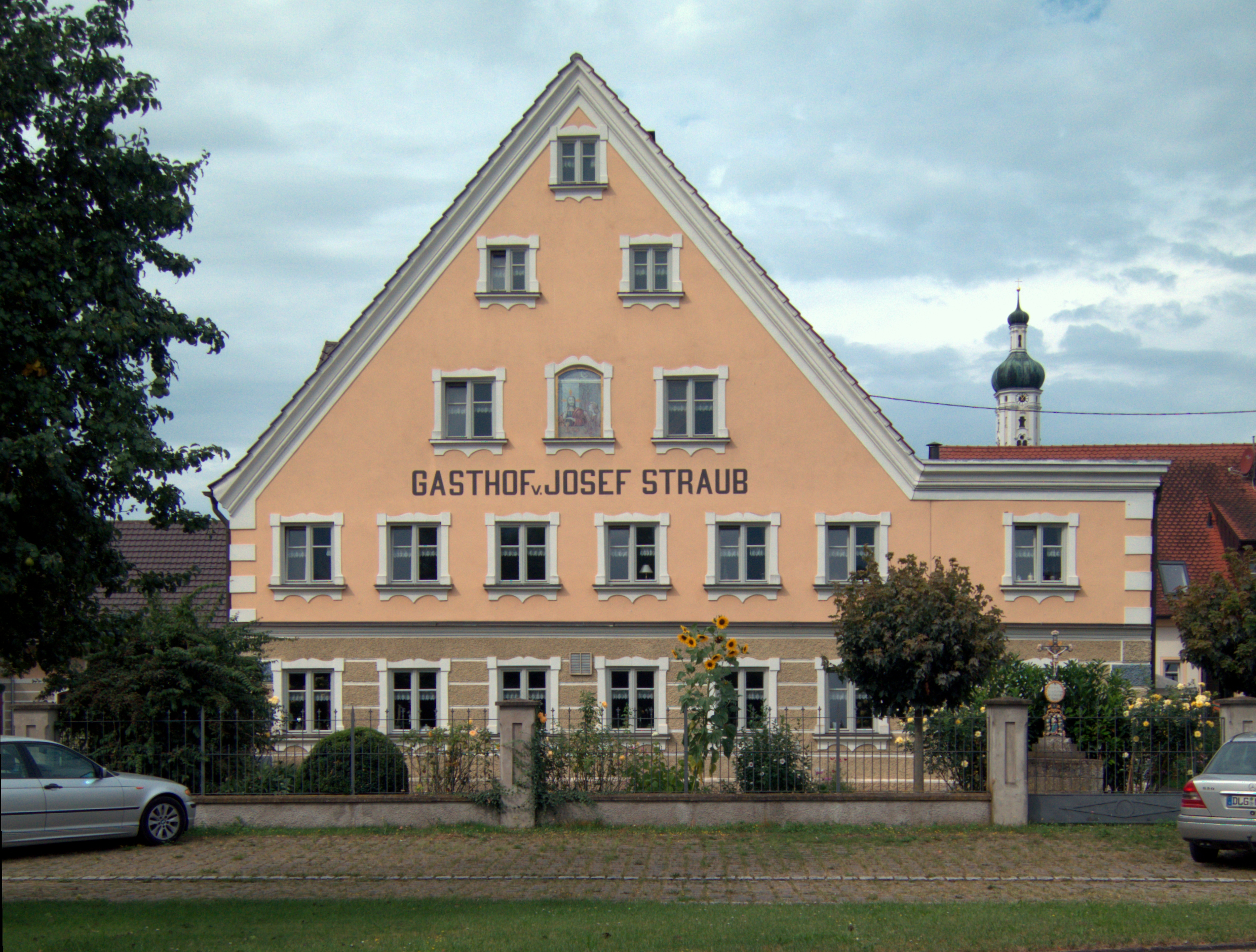 Gasthof Straub in Pfaffenhofen an der Zusam, Gemeinde Buttenwiesen. Blick auf die Ostfassade.Ansicht aus Ost